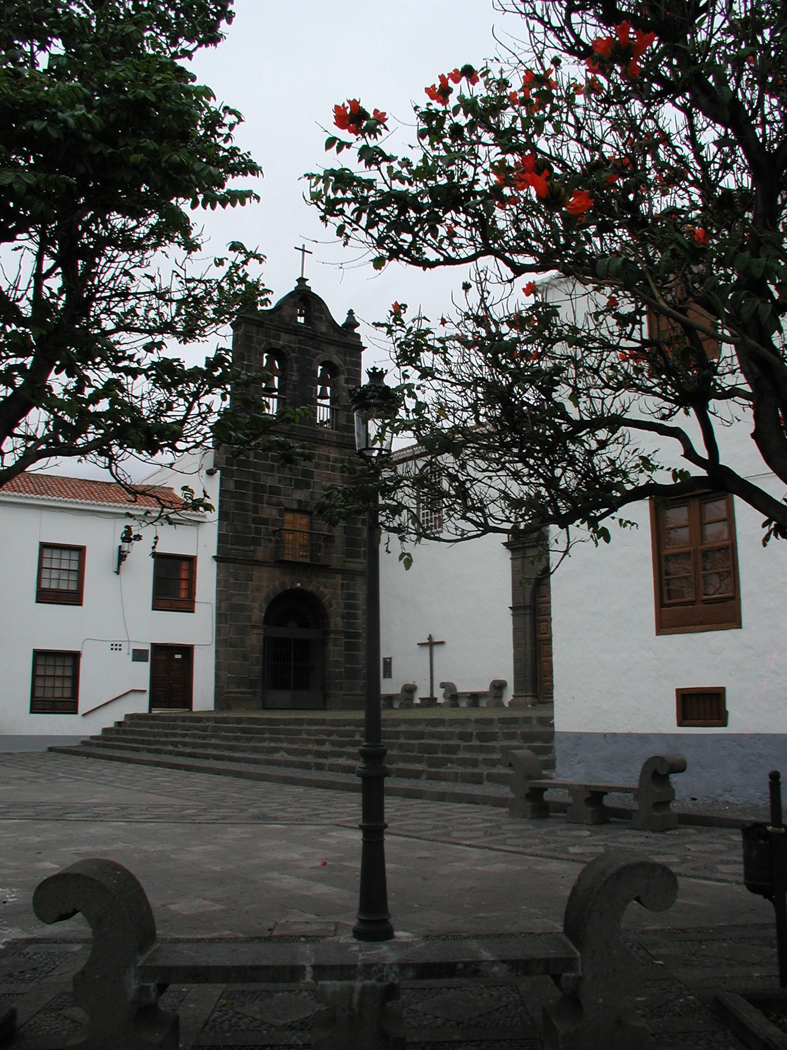 La Palma Santa Cruz